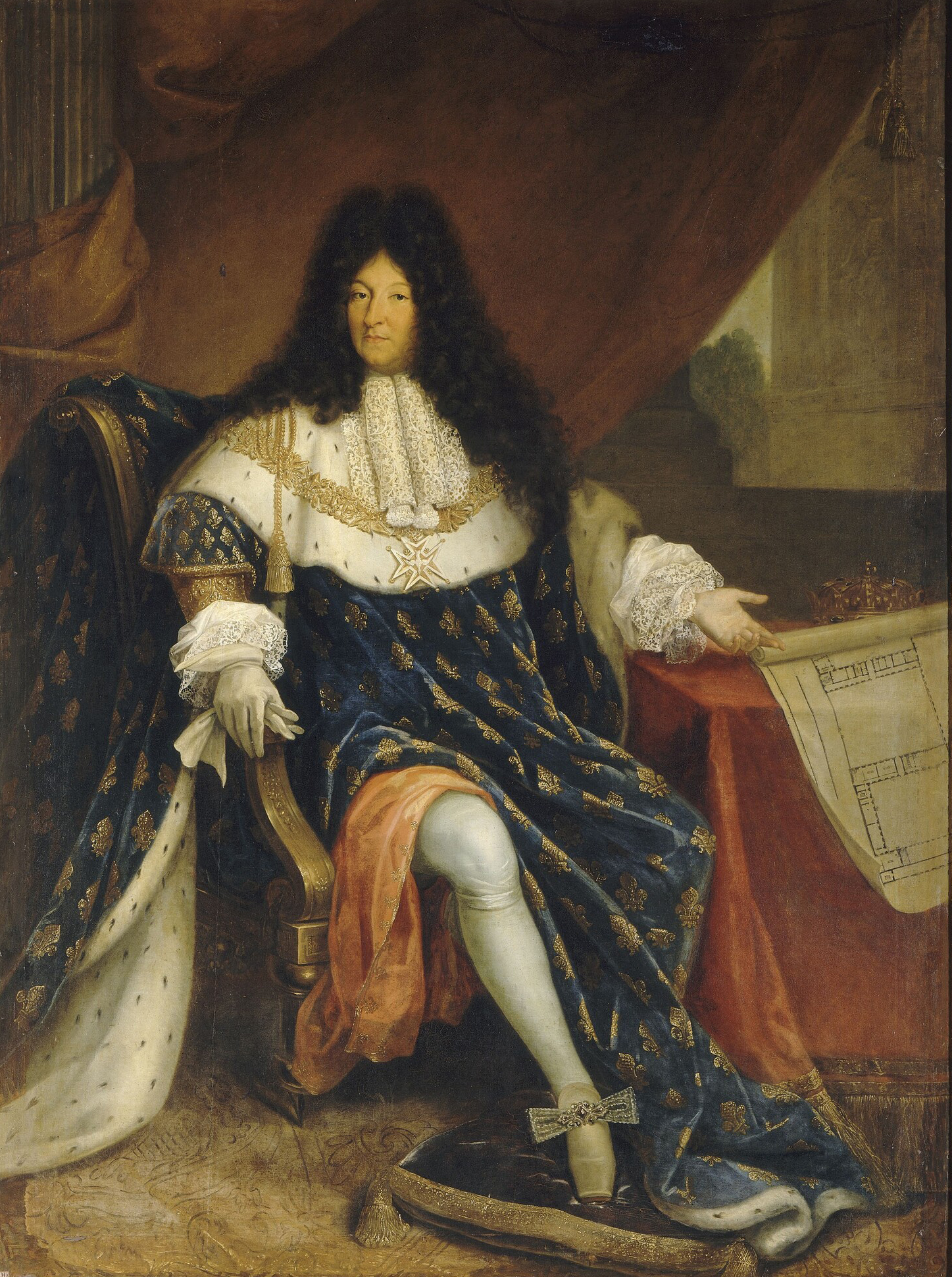 Portrait de Louis XIV of France (1638-1715) tenant le plan de la maison royale de Saint-Cyr